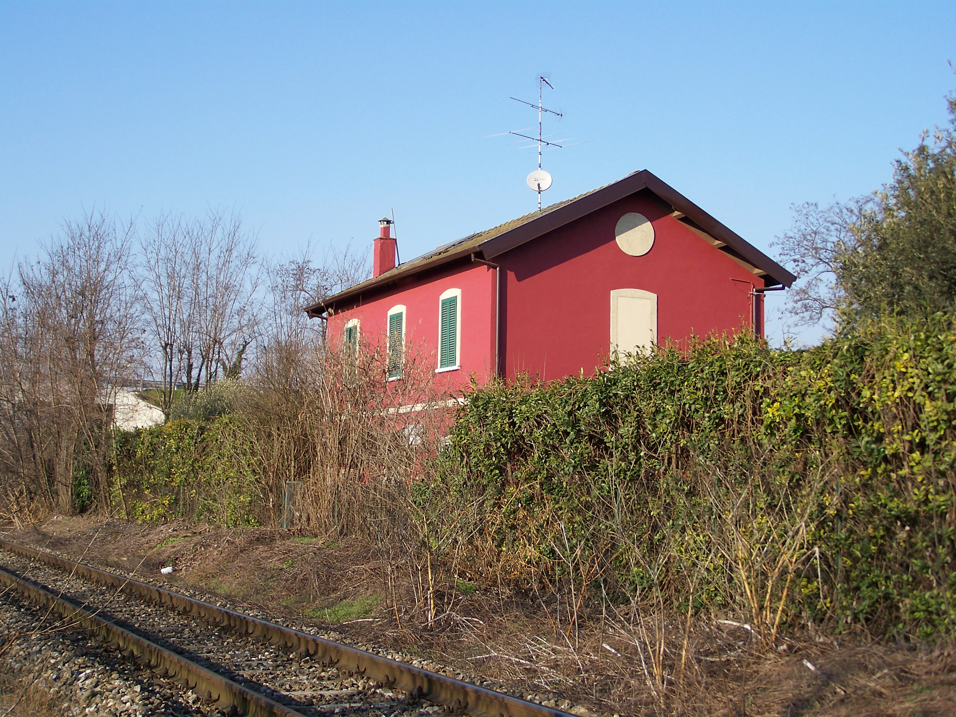 Il fabbricato viaggiatori della dismessa stazione di Borgosatollo sulla ferrovia Parma-Brescia